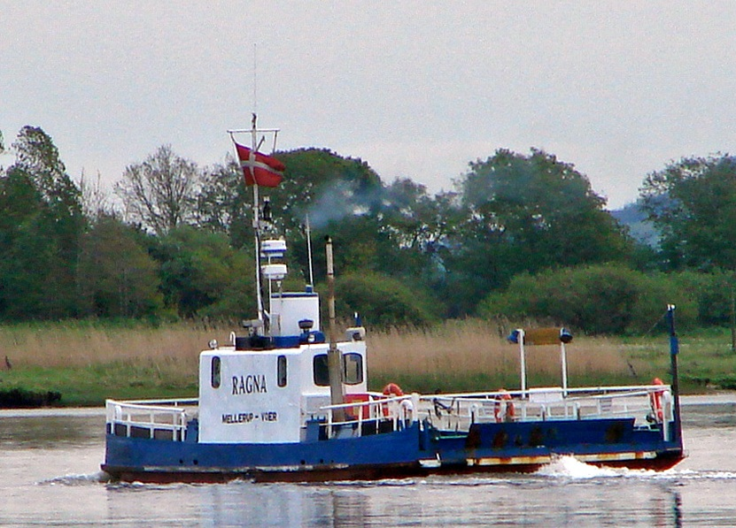 Mellerup-Voer færgen M/F Ragna på Randers Fjord.